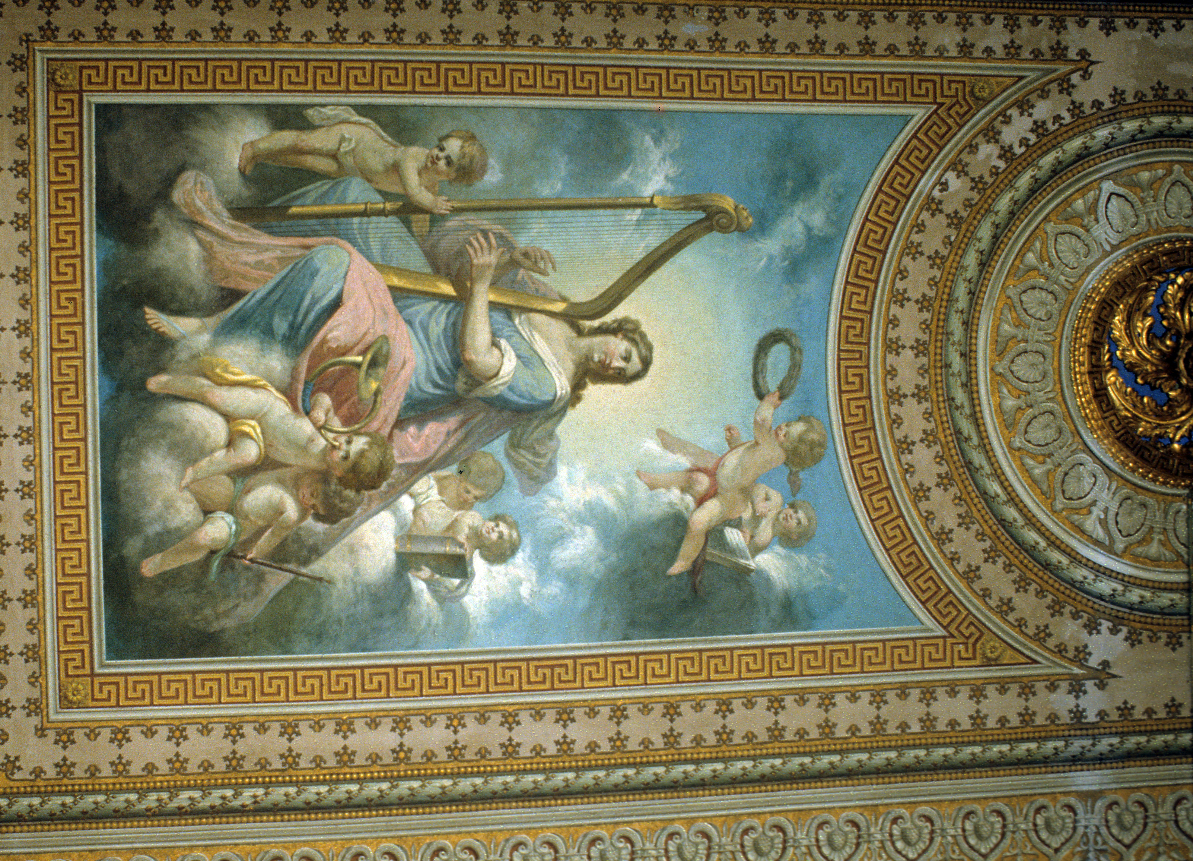 Palau March de Reus de la Rambla. Plafó pintat del sostre del saló principal que dóna a la Rambla